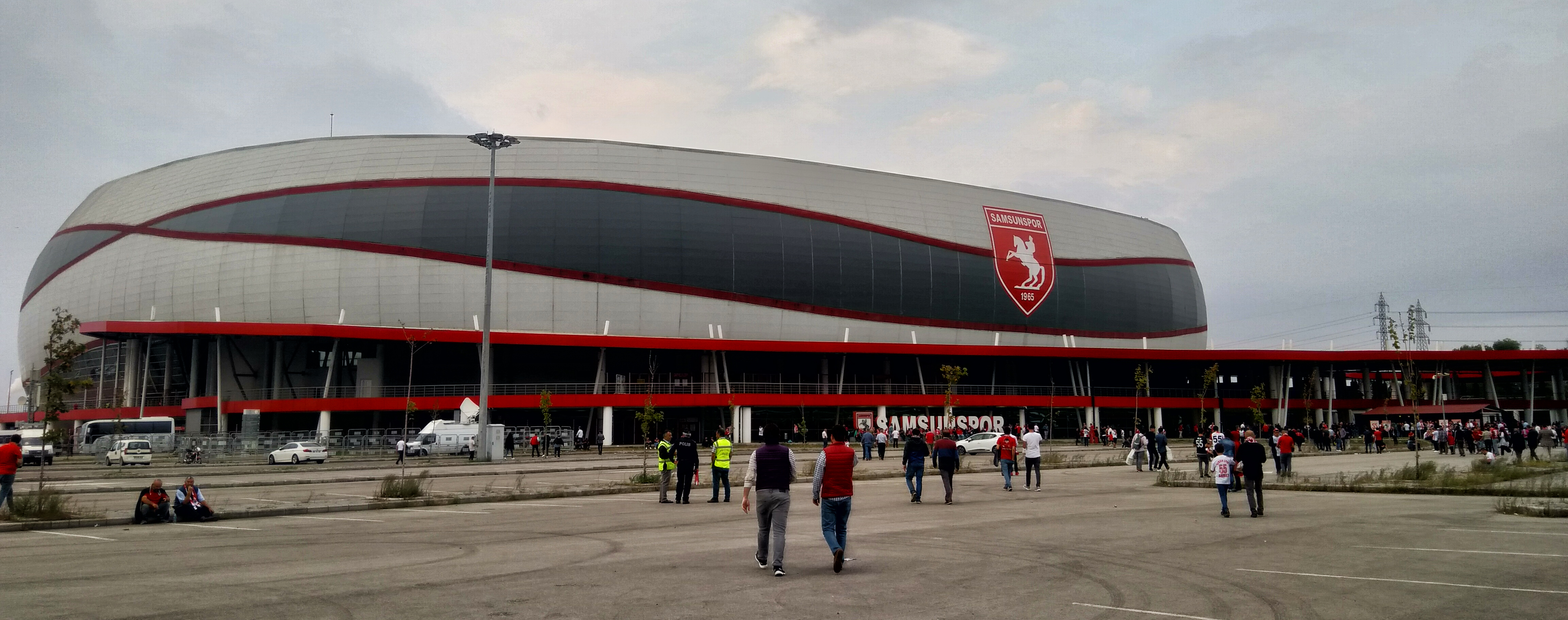 Ekim 2019 itibarıyla Samsun 19 Mayıs Stadyumu'nun güneybatı cephesinden görünümü.